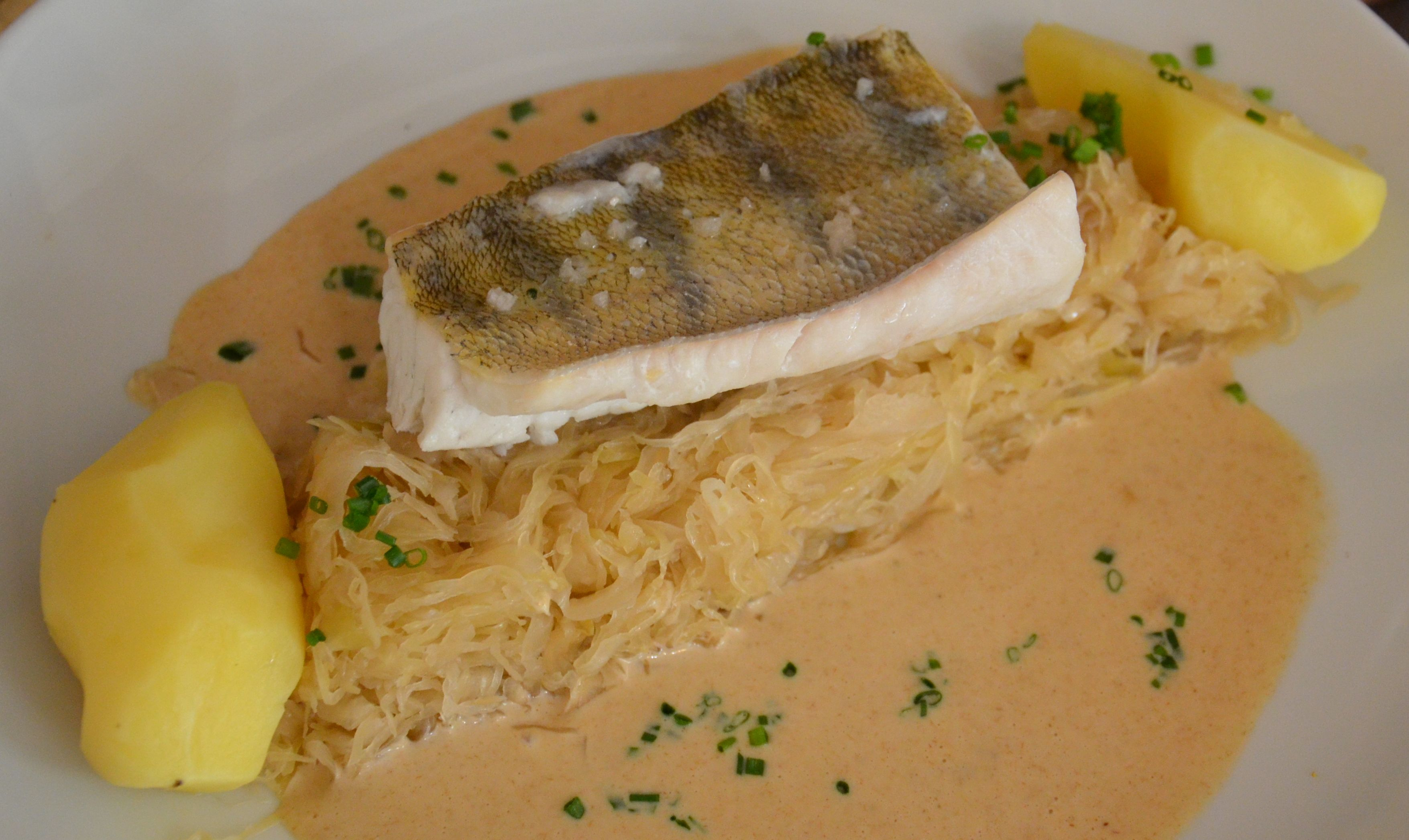 Filet de sandre sur choucroute accompagné d'une sauce à base de Riesling.